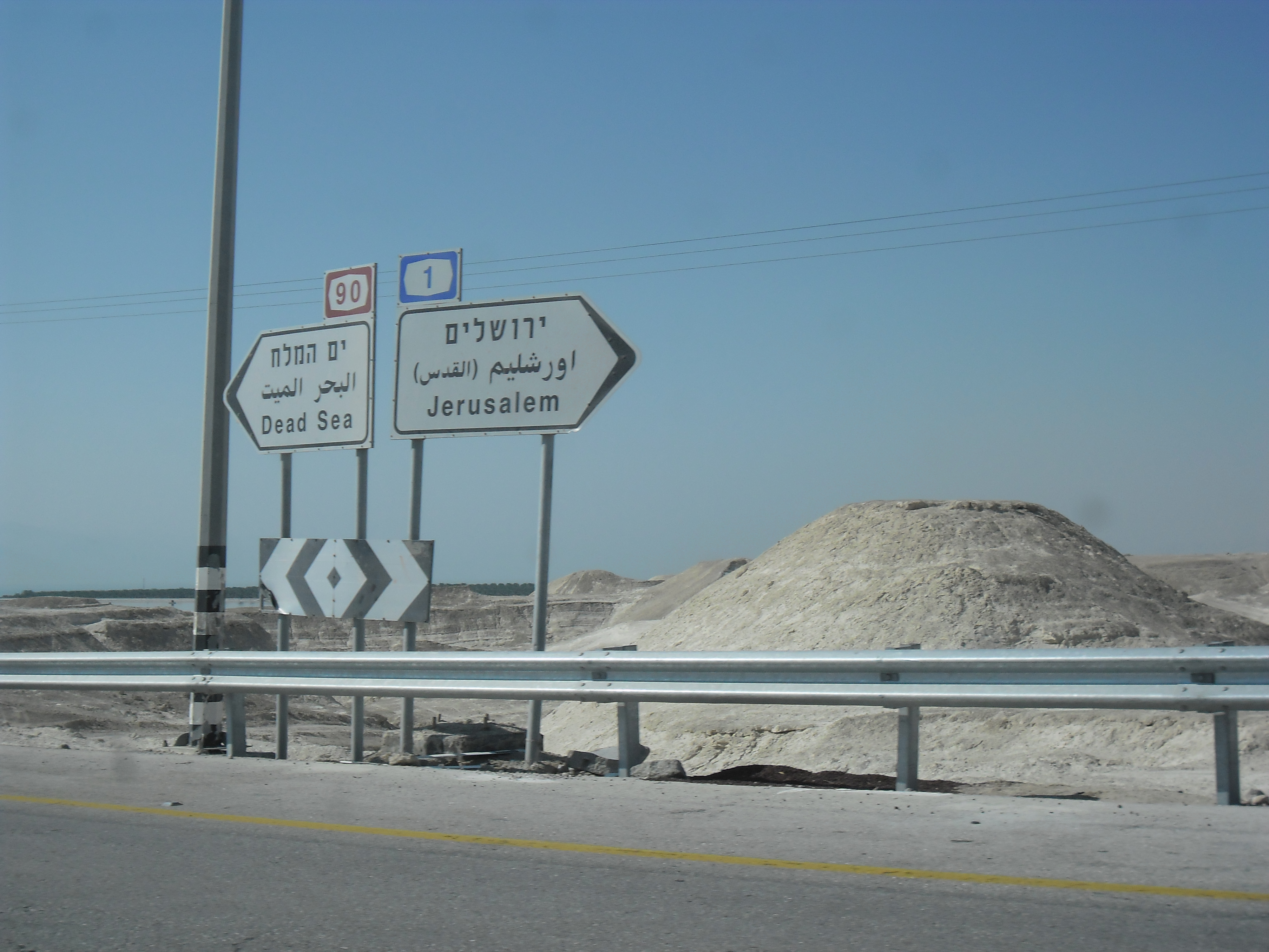 Panneaux de signalisation routière photographiée en Israël. Il indique en hébreu, arabe et anglais les directions "Jerusalem" (route 1) et "Dead Sea (Mer morte)" (route 90).